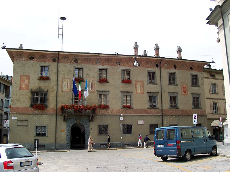 Sondrio - Palazzo Pretorio (Municipio)